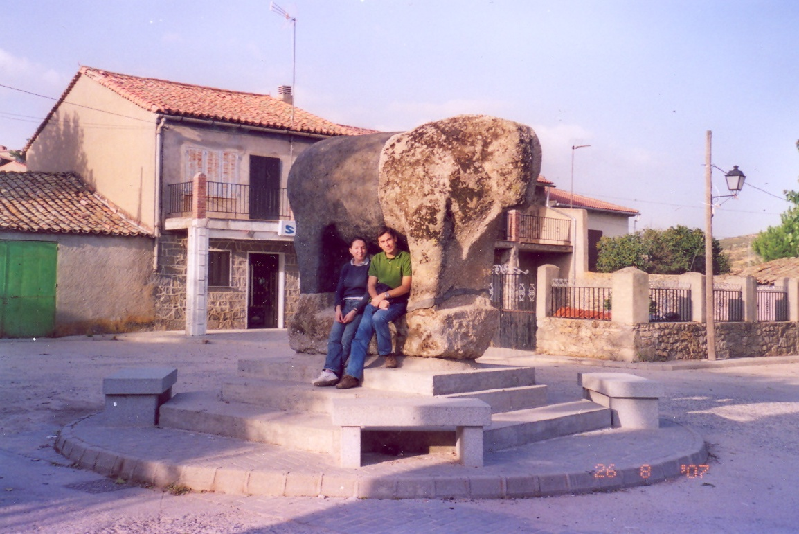 LA MAYOR ESCULTURA ZOOMORFA DE ORIGEN VETÓN ENCONTRADA HASTA EL MOMENTO EN ESPAÑA. PLAZA MAYOR DE VILLANUEVA DEL CAMPILLO (AVILA, ESPAÑA)